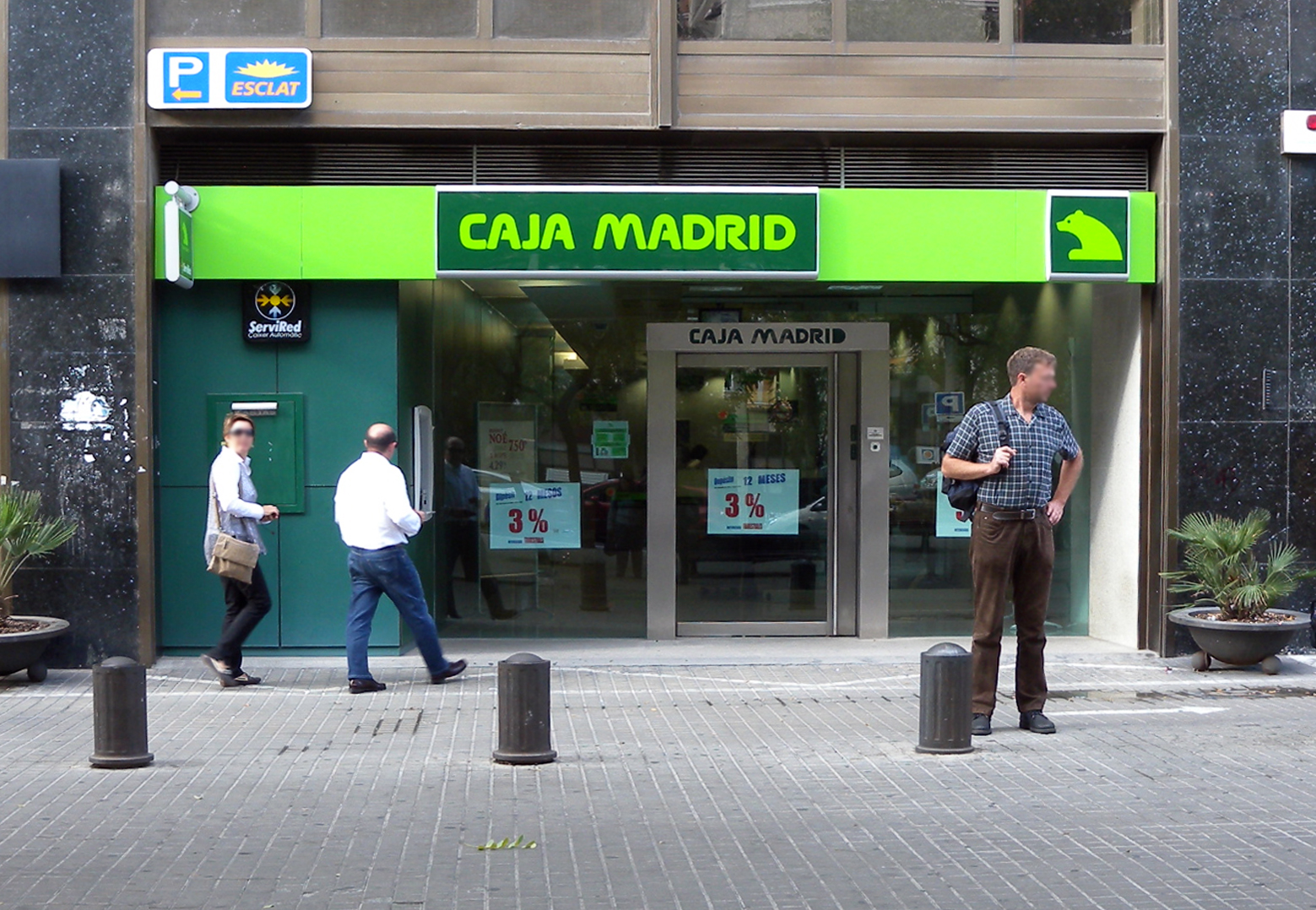 CajaMadrid